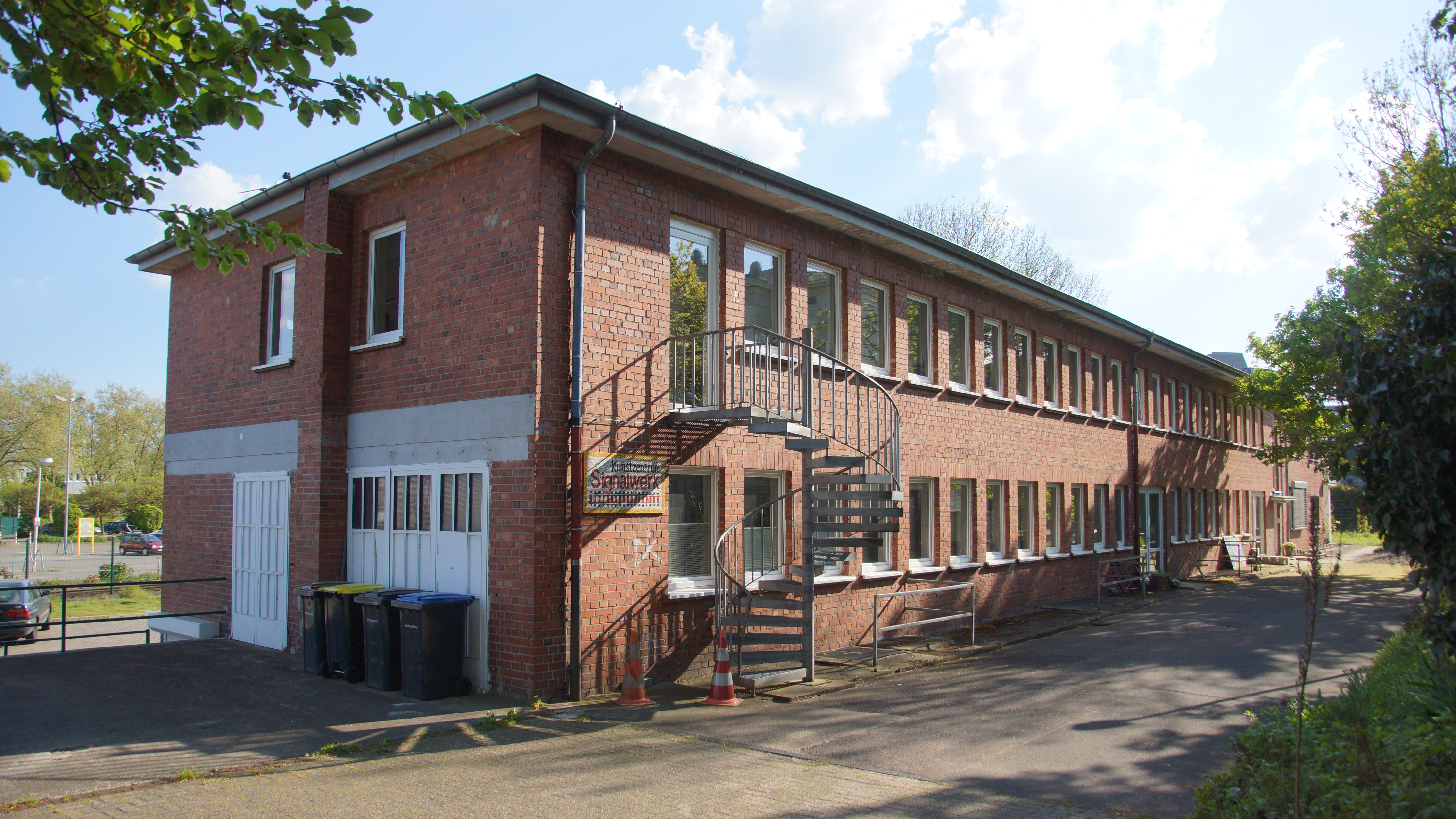 Kunstzentrum Signalwerk in Frechen, Kölner Straße 29-31, ehemalige Signalwerkstatt der Häfen und Güterverkehr Köln AG (HGK)